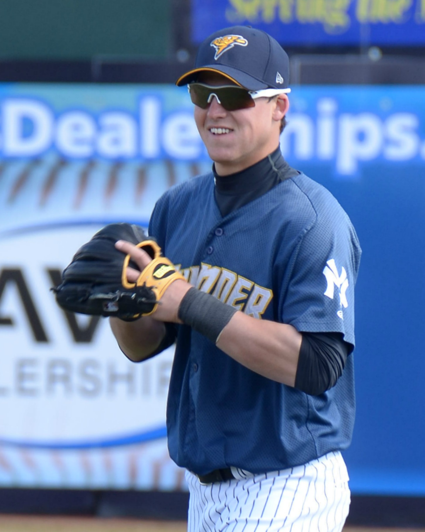 Tyler Austin